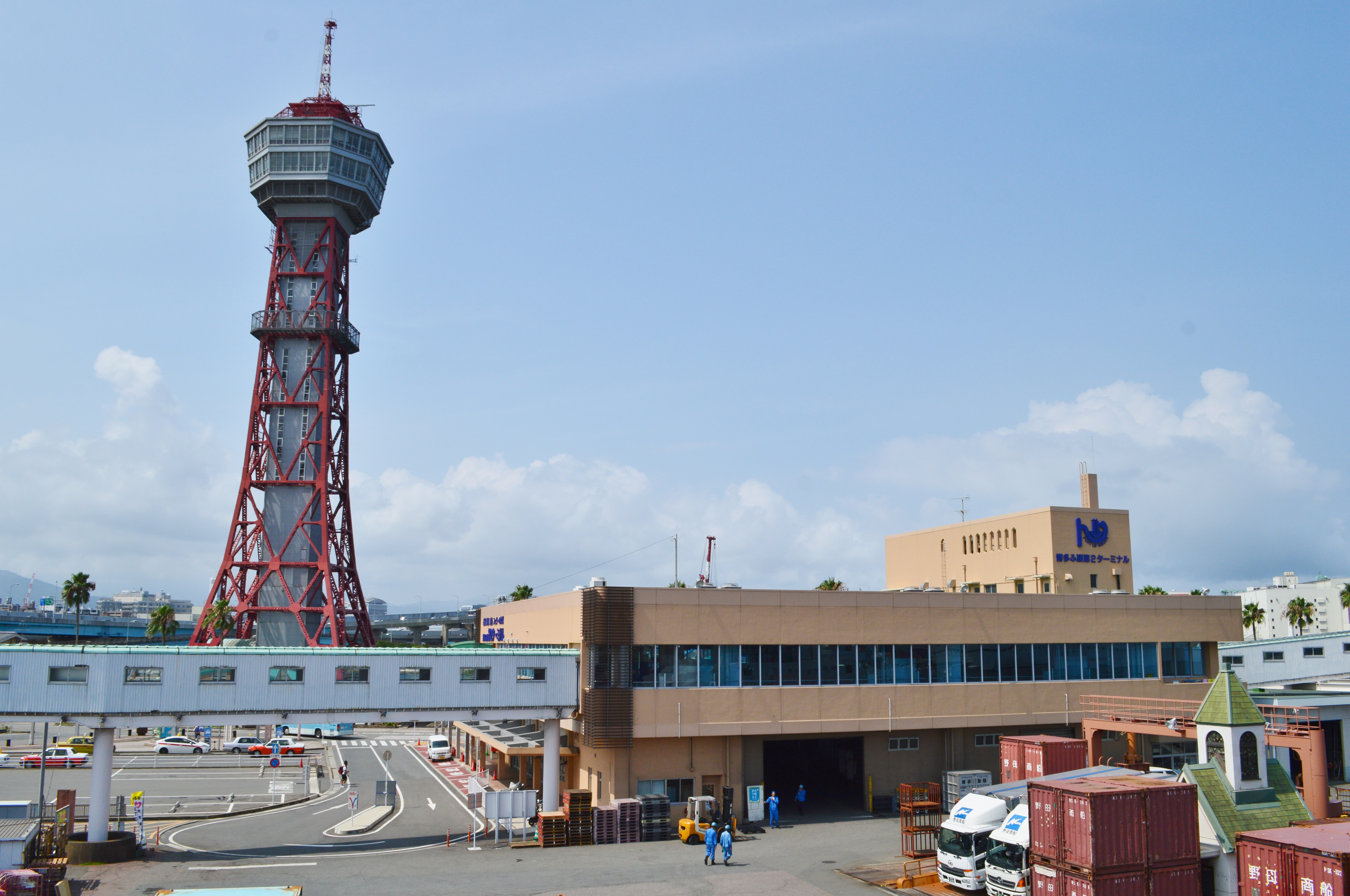 博多港第2ターミナル